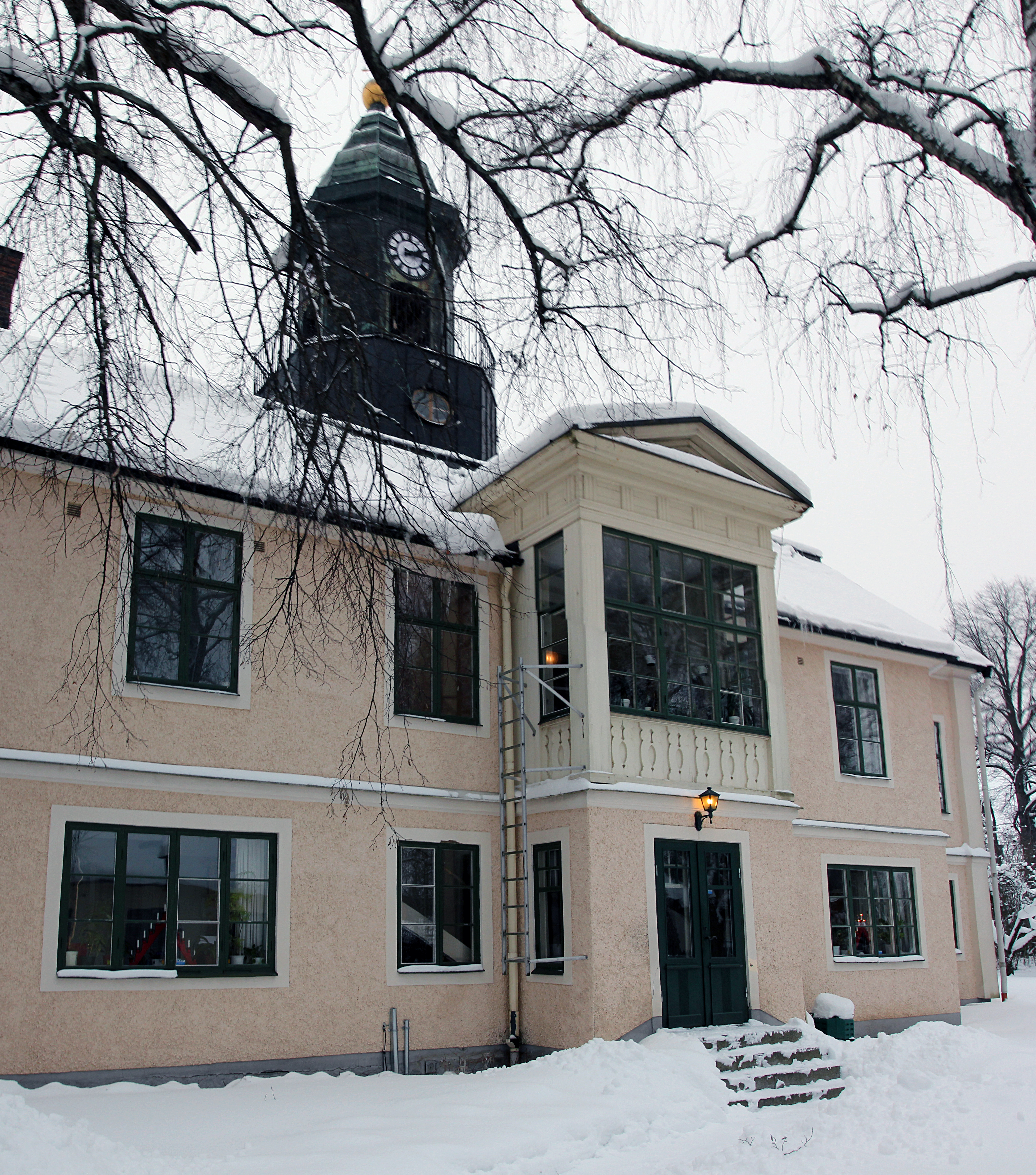 Rådhuset, Hedemora, Dalarna, Sverige. Baksidan mot innergården.